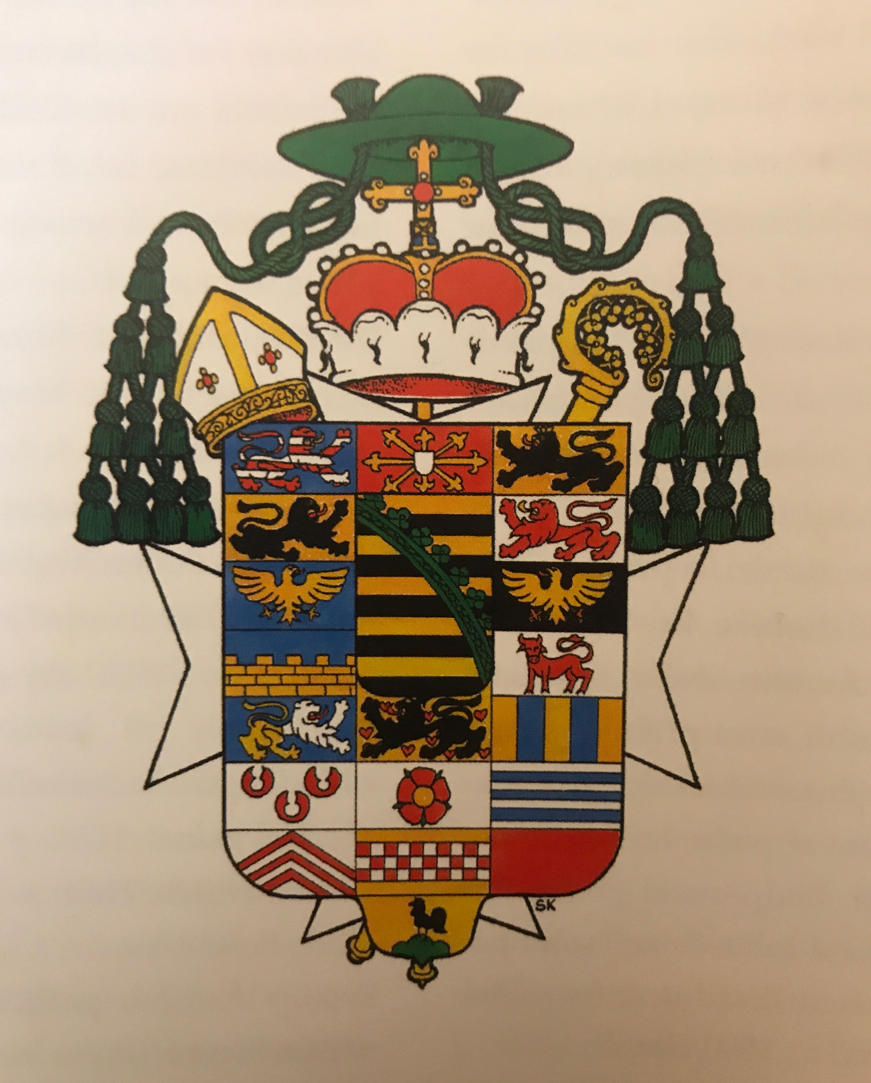 Mořic Adolf, vévoda ze Saschen-Zeitz, O.Melit, 8. biskup královéhradecký (1731-1733), 5. biskup litoměřický (1733-1759), titulární arcibiskup pharsaloský (1730). (Kresba znaku Stanislav Kasík, z publikace Biskupství litoměřické, ISBN 80-7192-978-6, Jaroslav Macek)